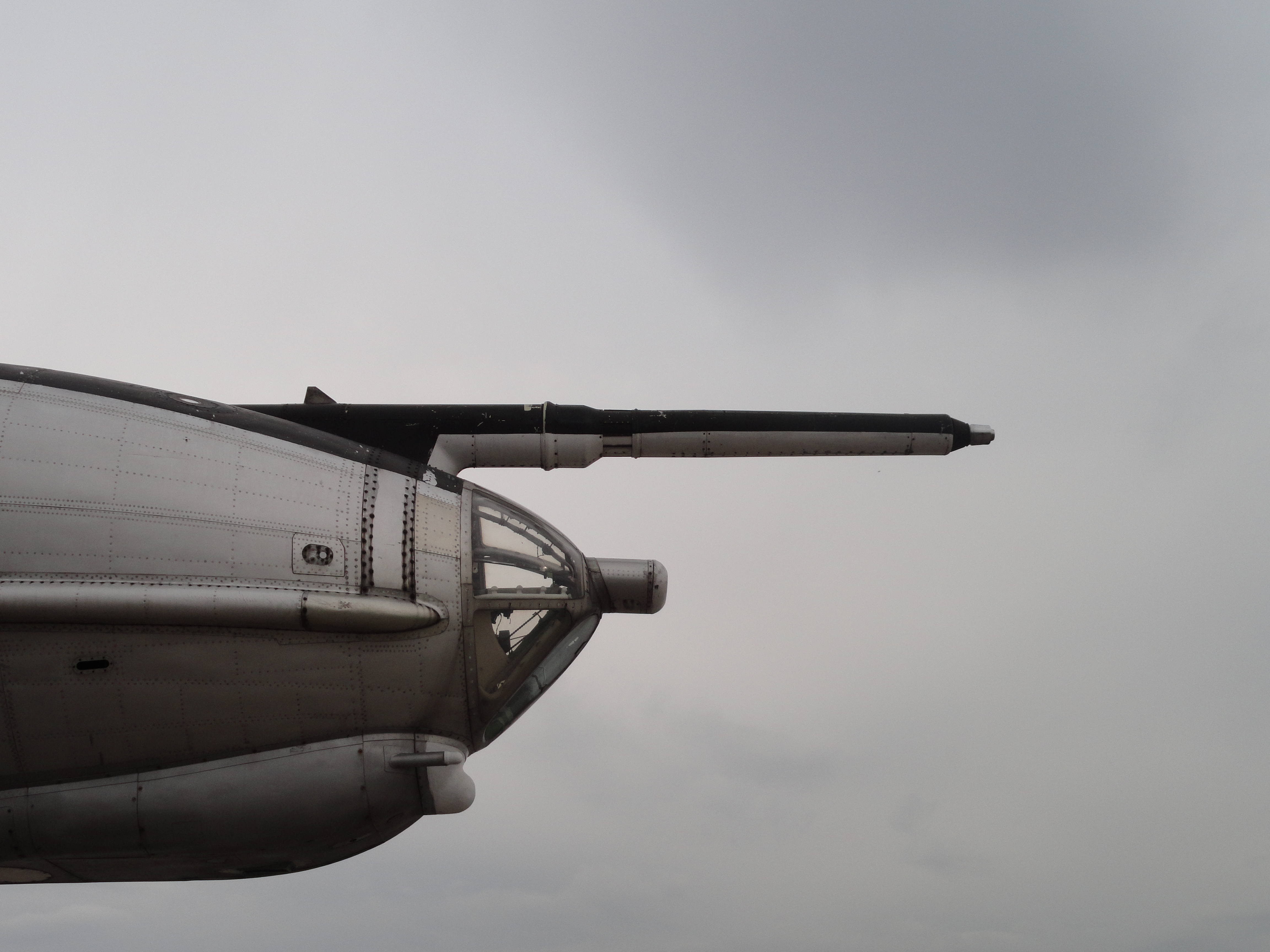 Кабина штурмана самолёта Ту-142, видно остекление и штанга заправки в воздухе. Фото сделано в музее авиации в Киеве.